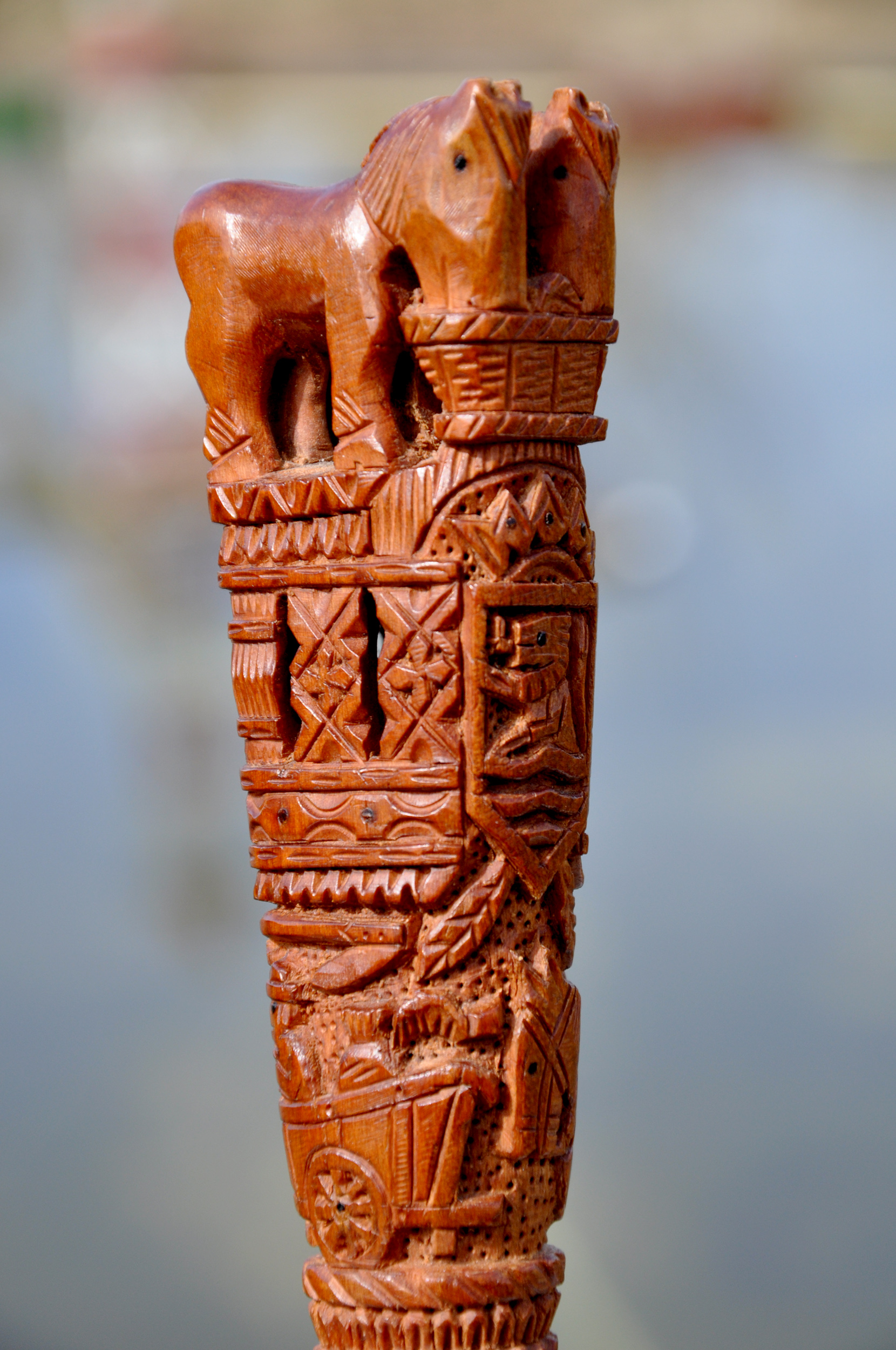 Zeeuws mes